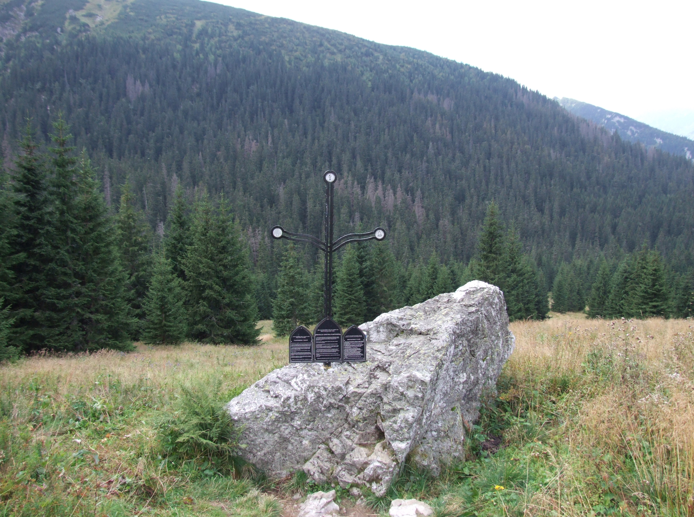 Zadnia Koperszadzka Pastwa